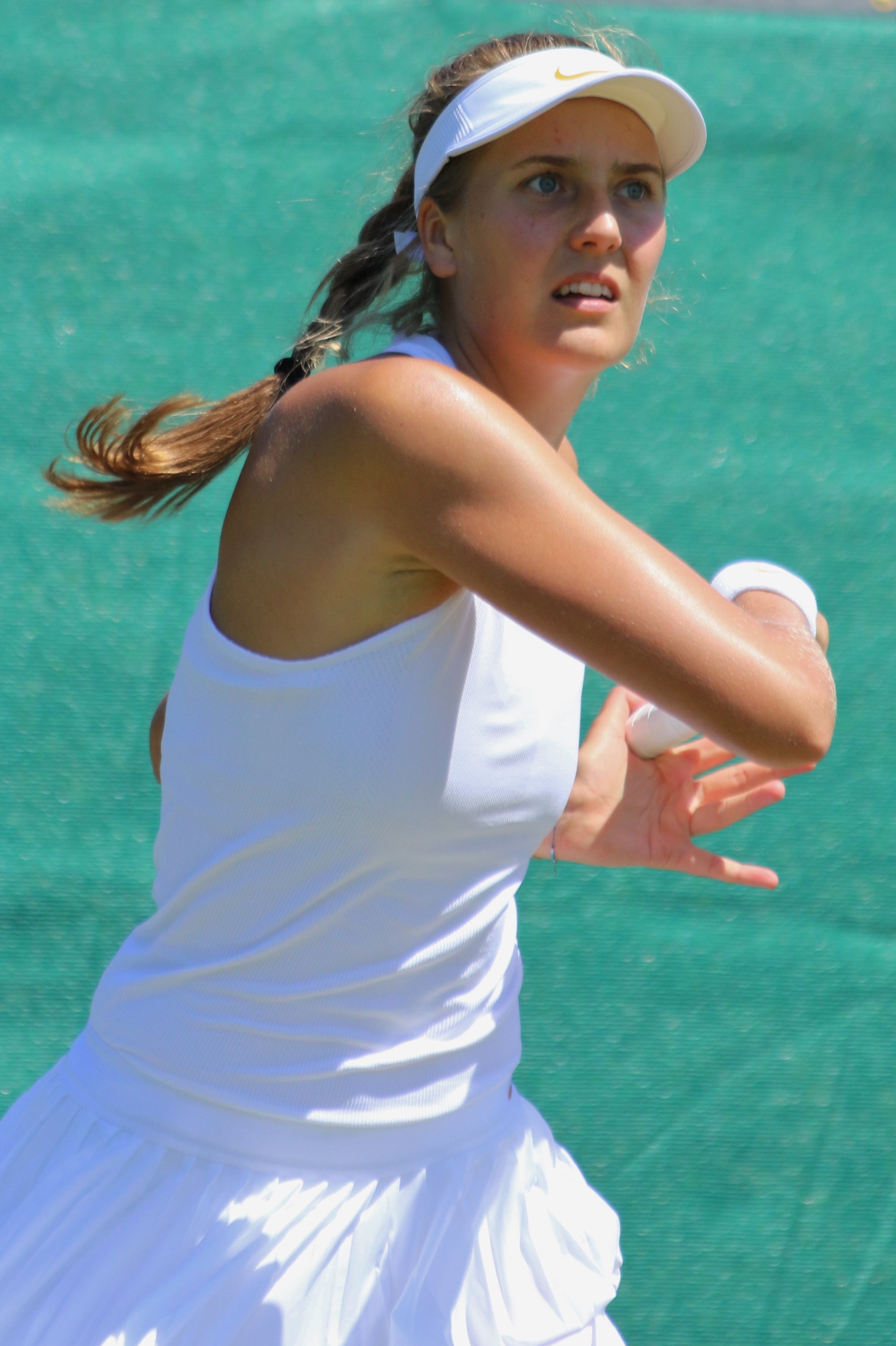 Lottner WMQ18 (12)